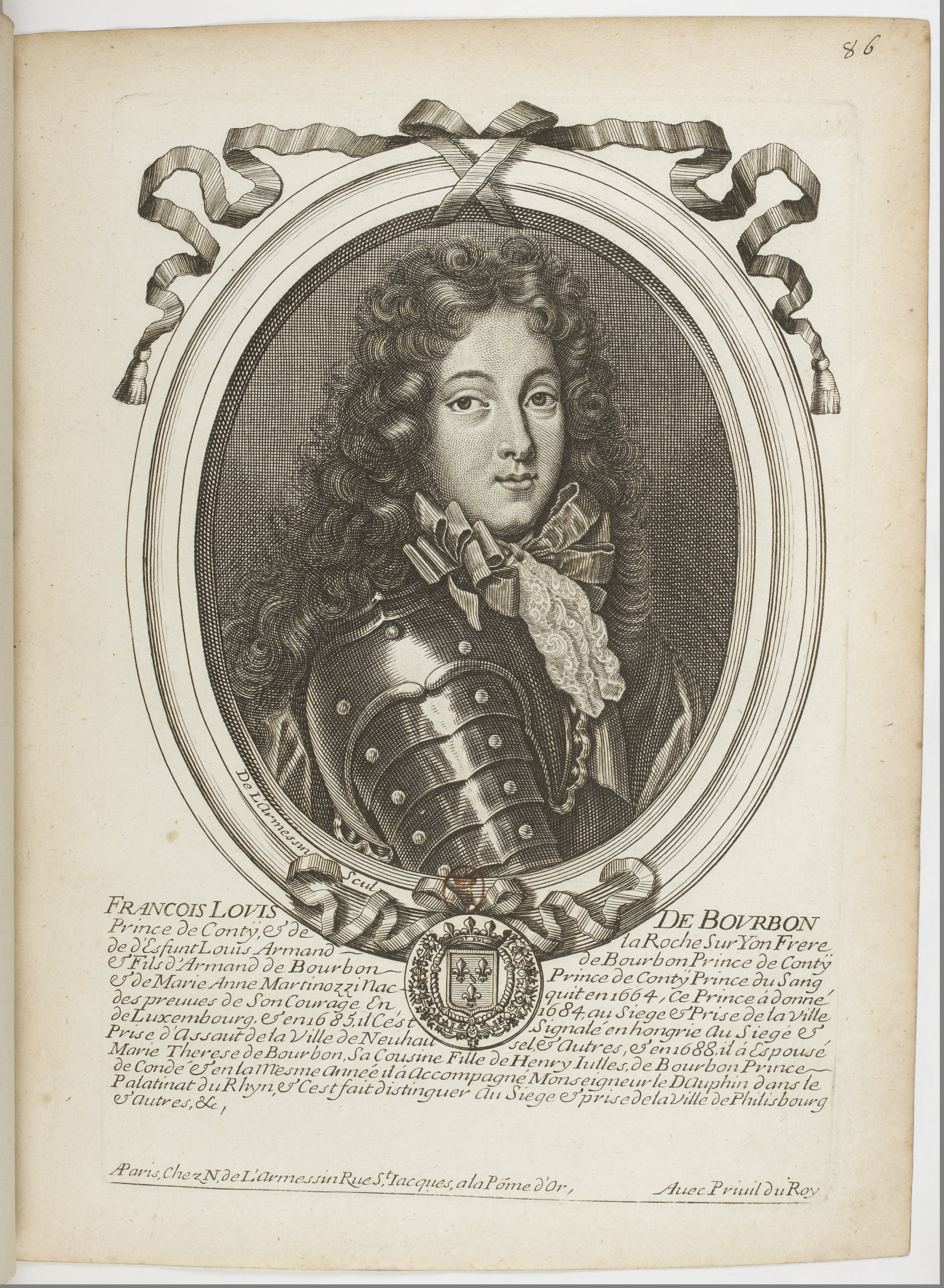 Les augustes représentations de tous les rois de France, depuis Pharamond jusqu'à Louis XIV,... avec un abrégé historique sous chacun, contenant leurs naissances, inclinations et actions plus remarquables pendant leurs règnes